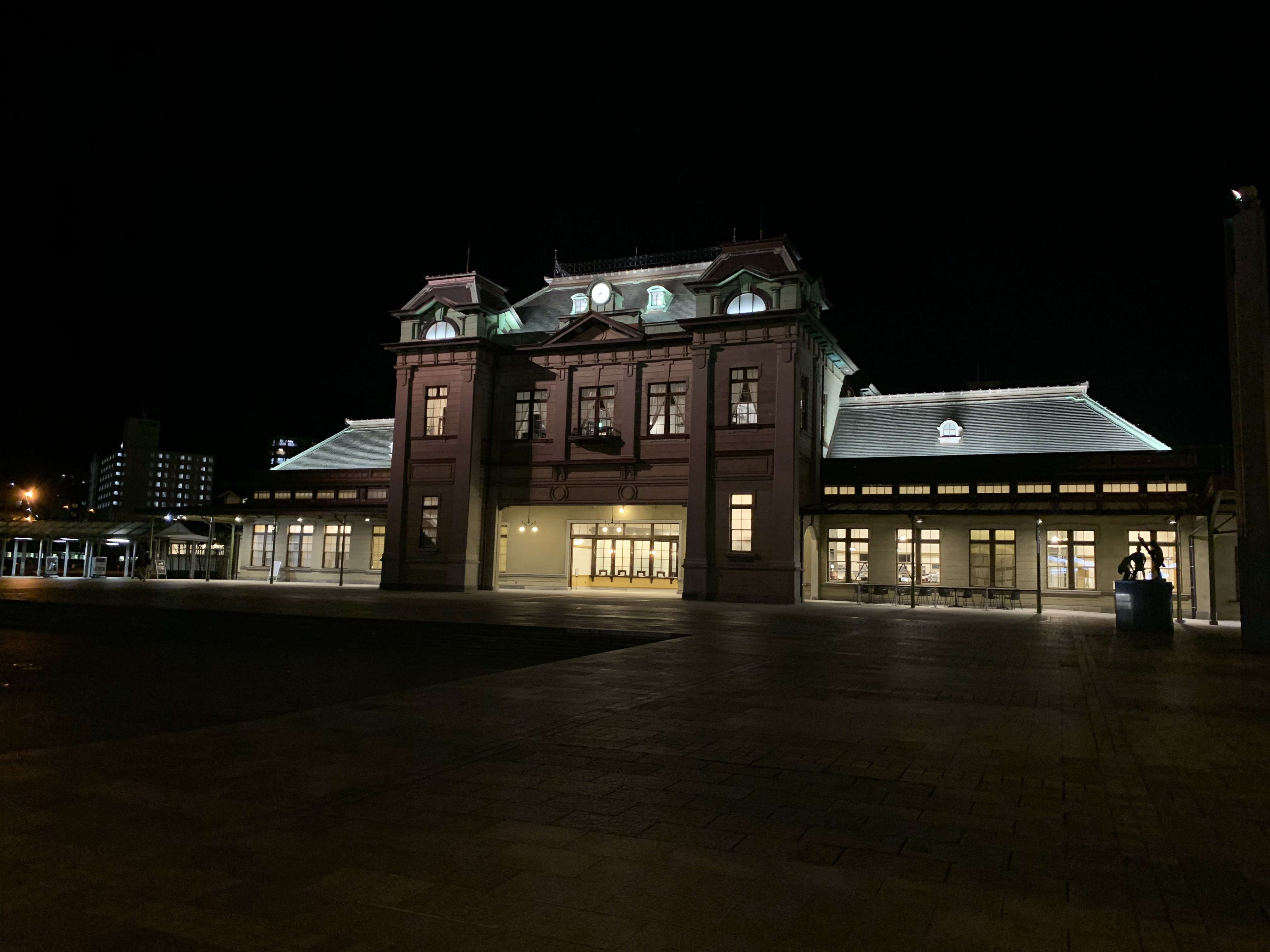 門司港駅の駅舎（2020年3月）